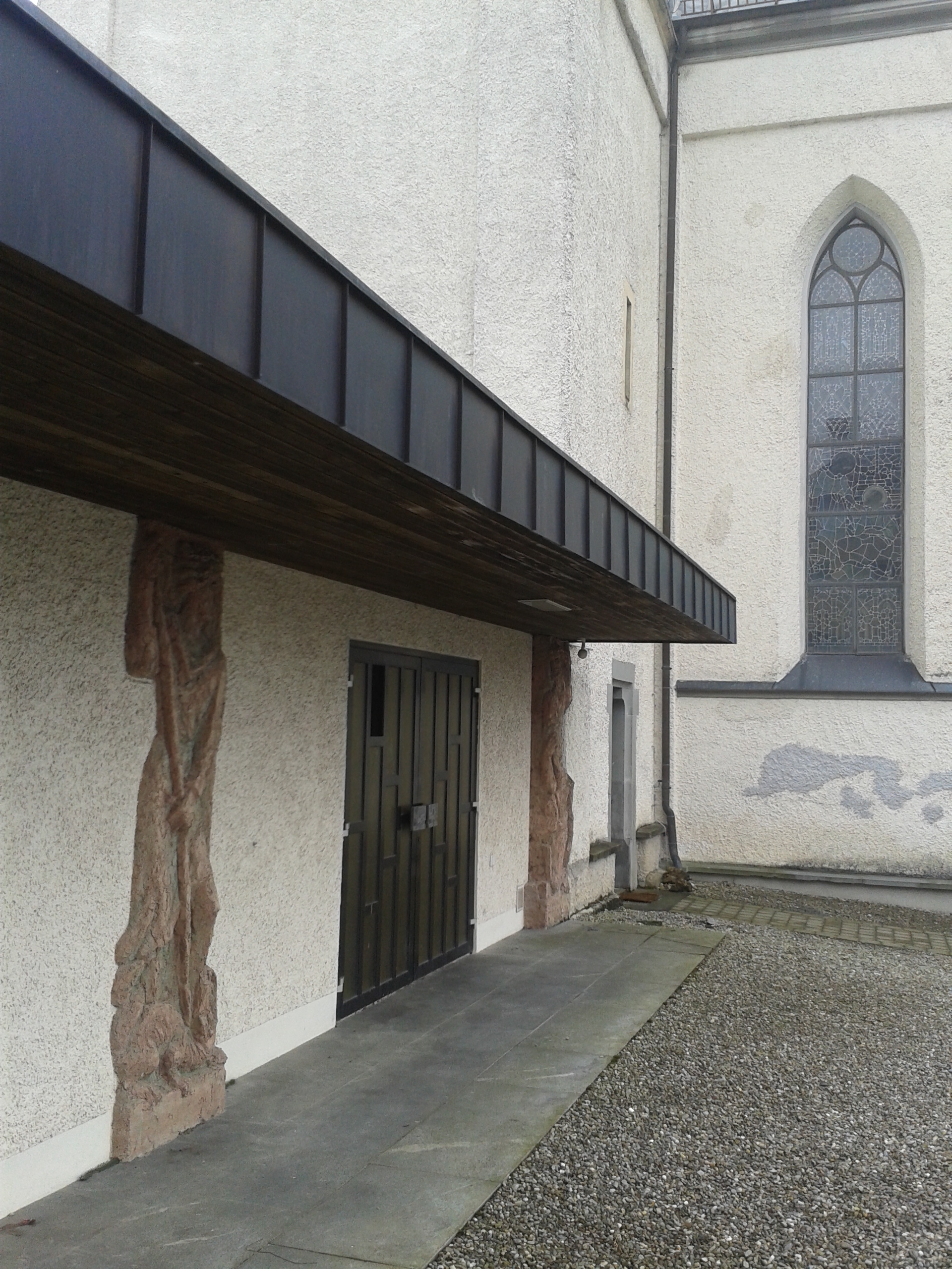 Aufbahrungshalle mit 2 Heiligenreliefs aus Terracotta von Emmerich Kerle aus dem Jahre 1947 in Kennelbach Vbg; Blick von der Seite auf die Pfarrkirche